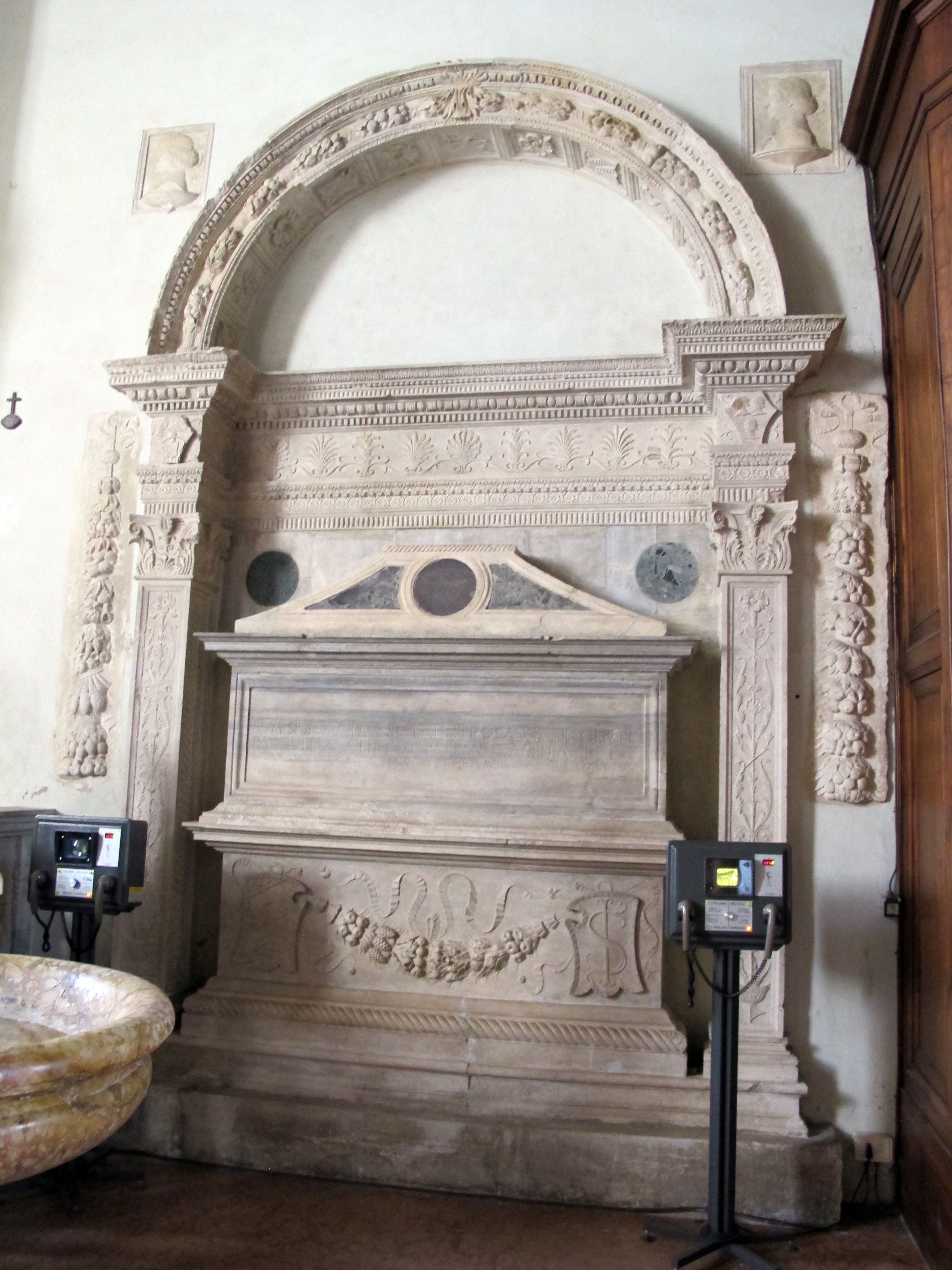 Tempio Malatestiano - MIBAC This is a photo of a monument which is part of cultural heritage of Italy.